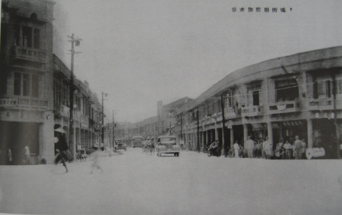 鹽水伽藍廟街